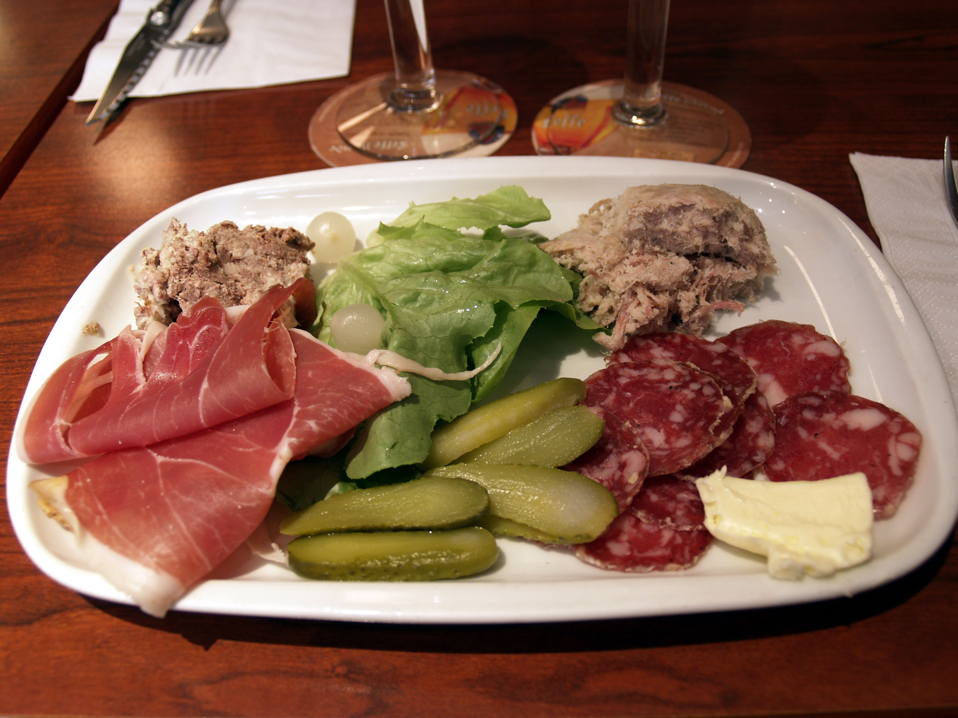 Skinke, pølse, terrine og salat